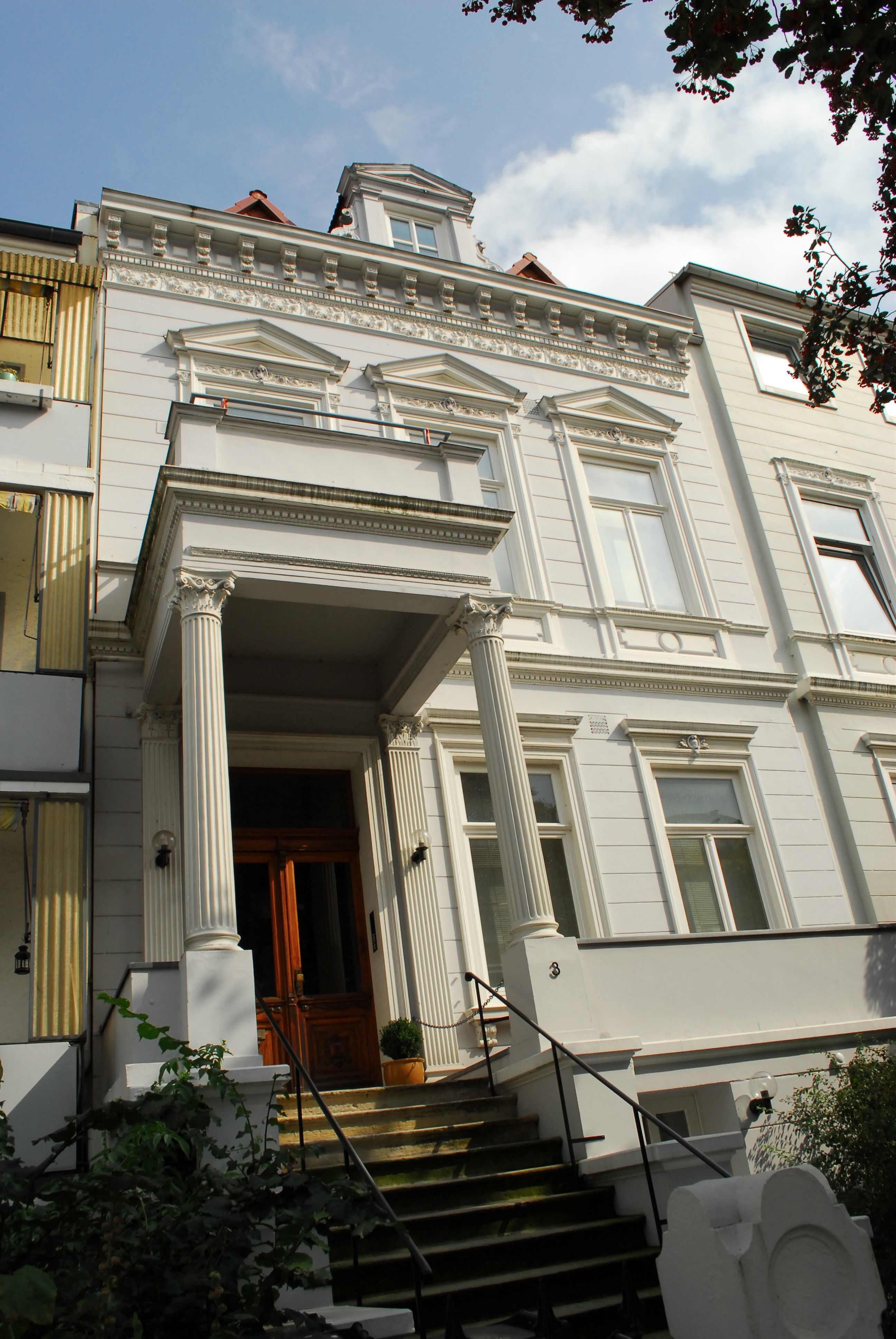 Wohnhaus in Bremen, Richard-Wagner-Straße 3.Das abgebildete Objekt ist ein geschütztes Kulturdenkmal in der Freien Hansestadt Bremen, mit der Nr. 1035 beim Landesamt für Denkmalpflege registriert.